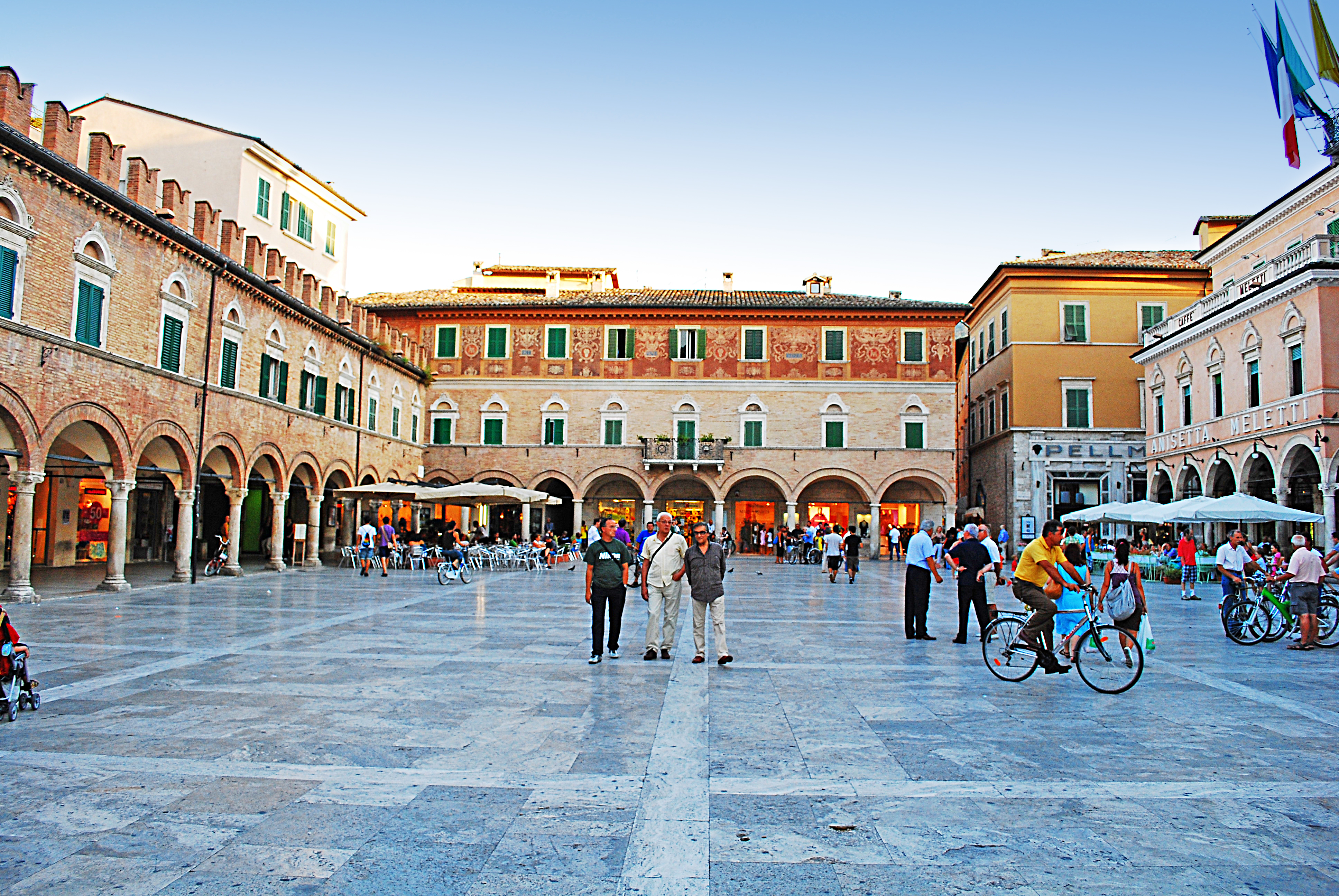 Piazza del popolo, Ascoli Piceno - Italia.